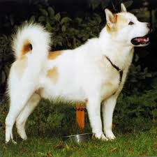 Perro Esquimal Canadiense